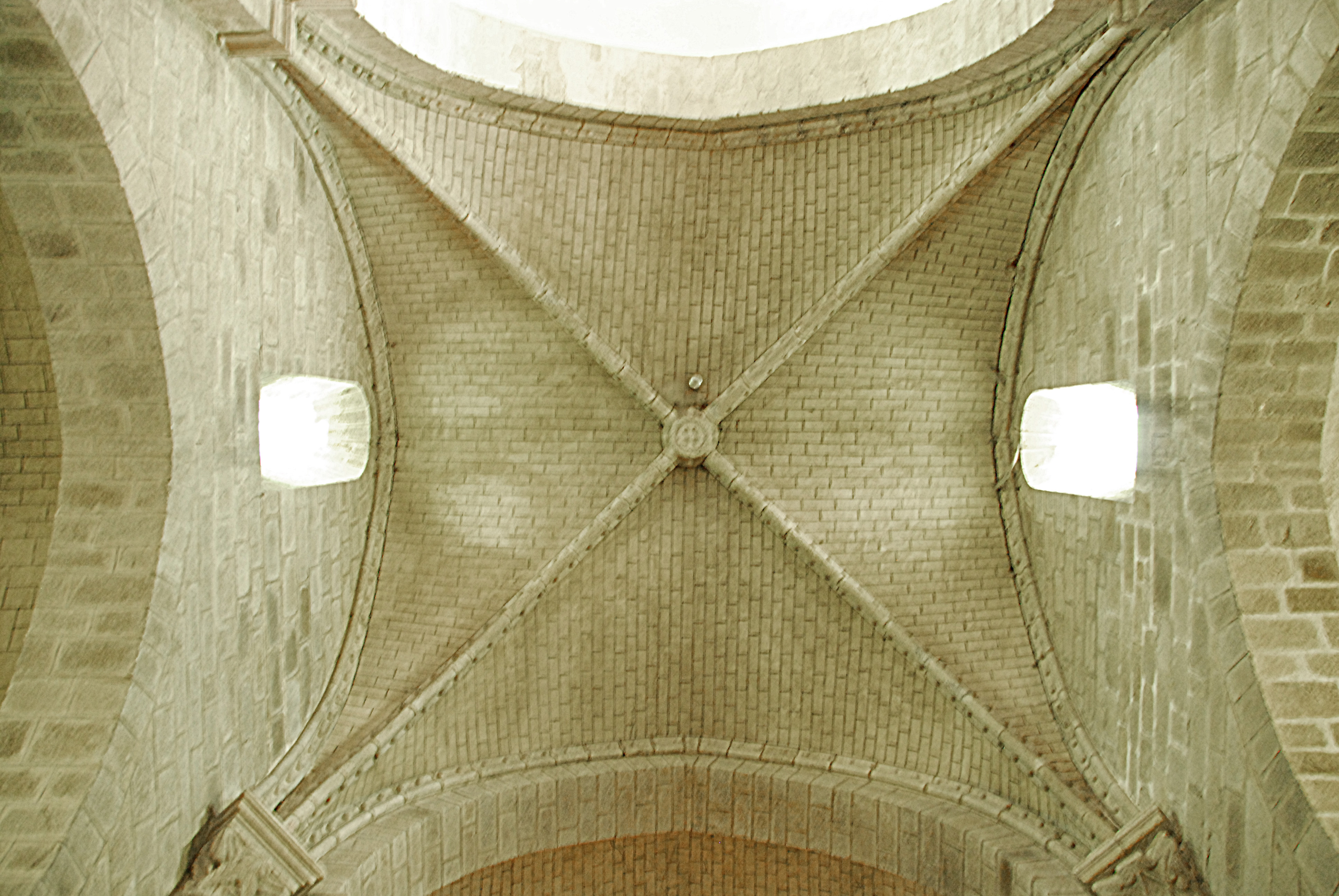 N.-D. de La Souterraine, Kreuzrippengewölbe, Joch 4